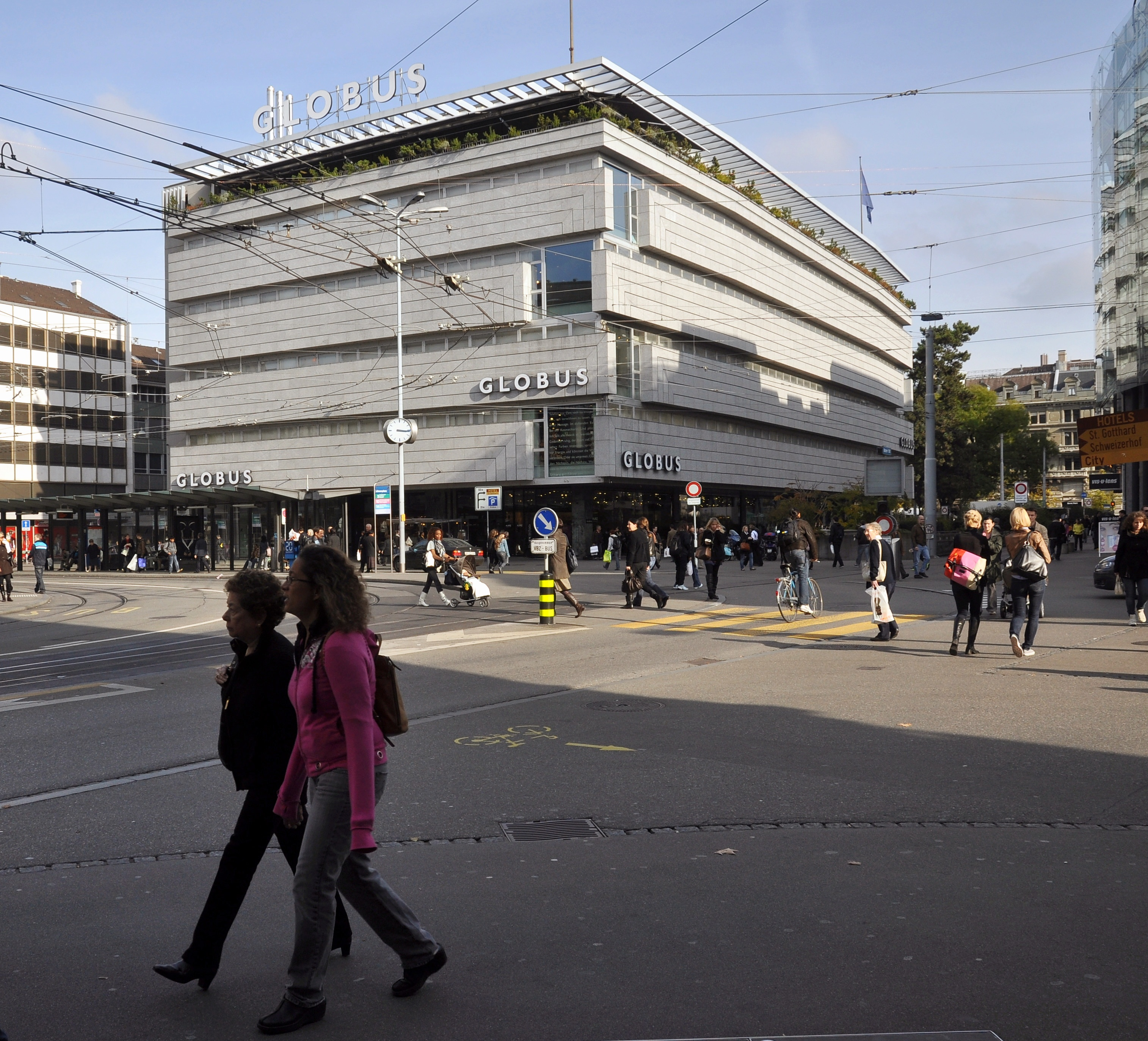 Kaufhaus Globus, Zürich Ansicht vom Löwenplatz Ausführung 1968-69 Architekt: Karl Egender